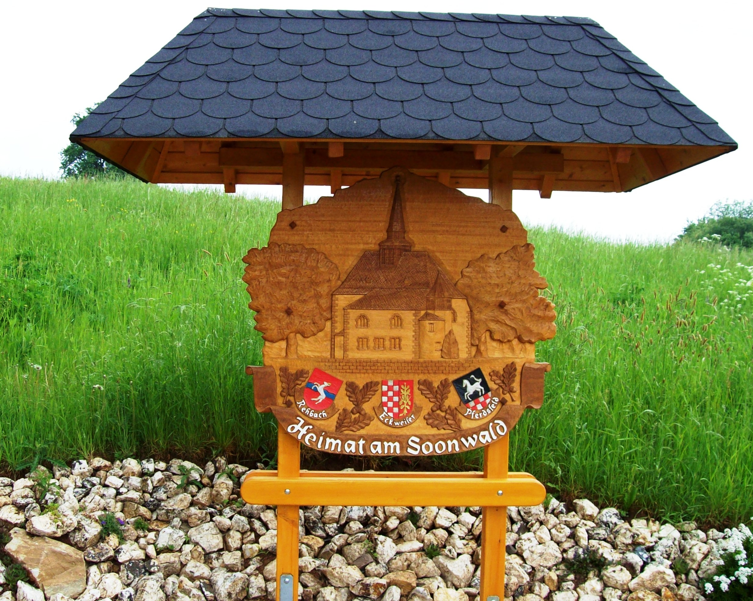 Denkmal für den untergegangenen Ort Eckweiler, heute Wüstung. Nur die Kirche steht noch.